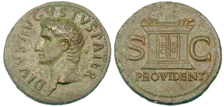 Rome, issue of Tiberius, ca. AD 22/3–30.DIVVS AVGVSTVS PATER, radiate head of Augustus leftFacade and altar enclosure of Ara Providentiae Augusti, double panelled door closed, PROVIDENT below, S—C in fields.RIC (Tiberius) 81.